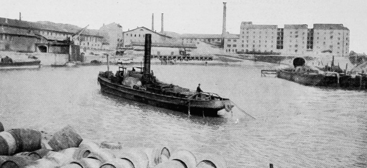 Dictionnaire illustré des communes du département du Rhône. Tome 2 / par MM. E. de Rolland et D. Clouzet.